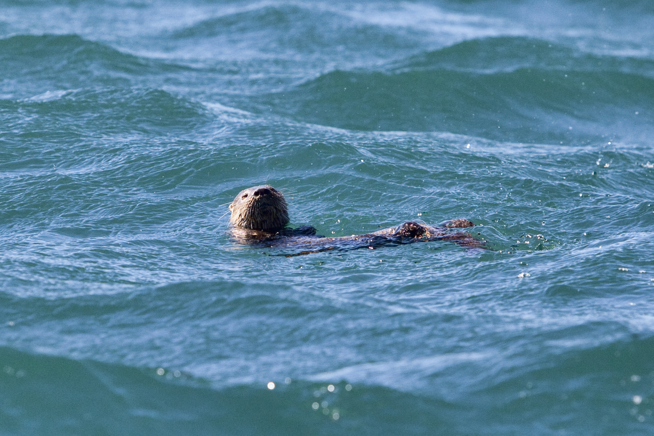 Chungungo.